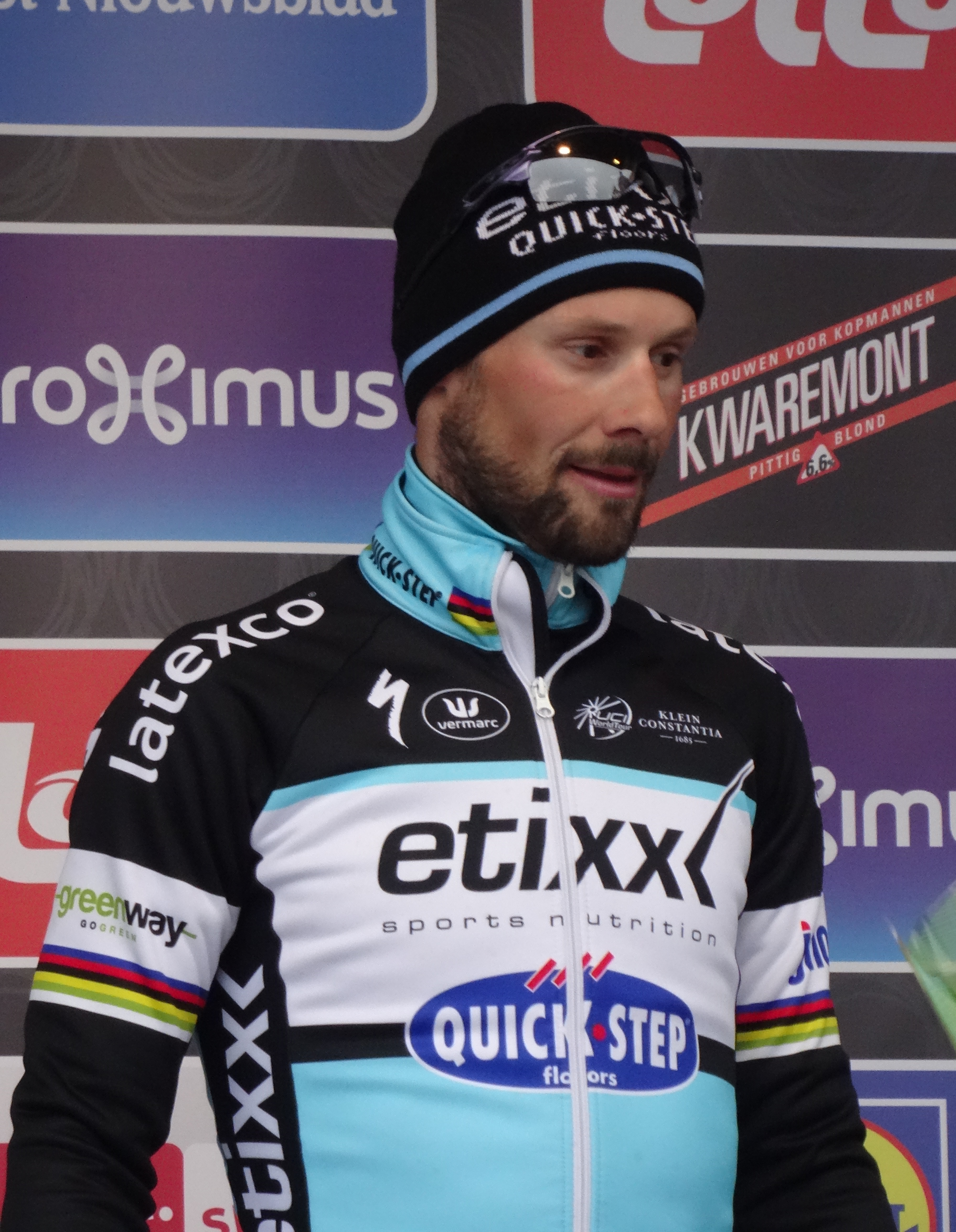 Reportage réalisé le samedi 28 février à l'occasion du départ et de l'arrivée du Circuit Het Nieuwsblad 2015 à Gand, Belgique.